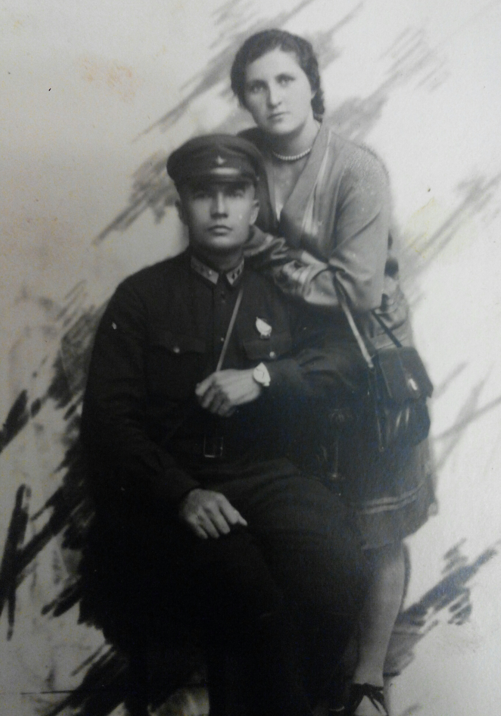 Петр Шелухин с женой?